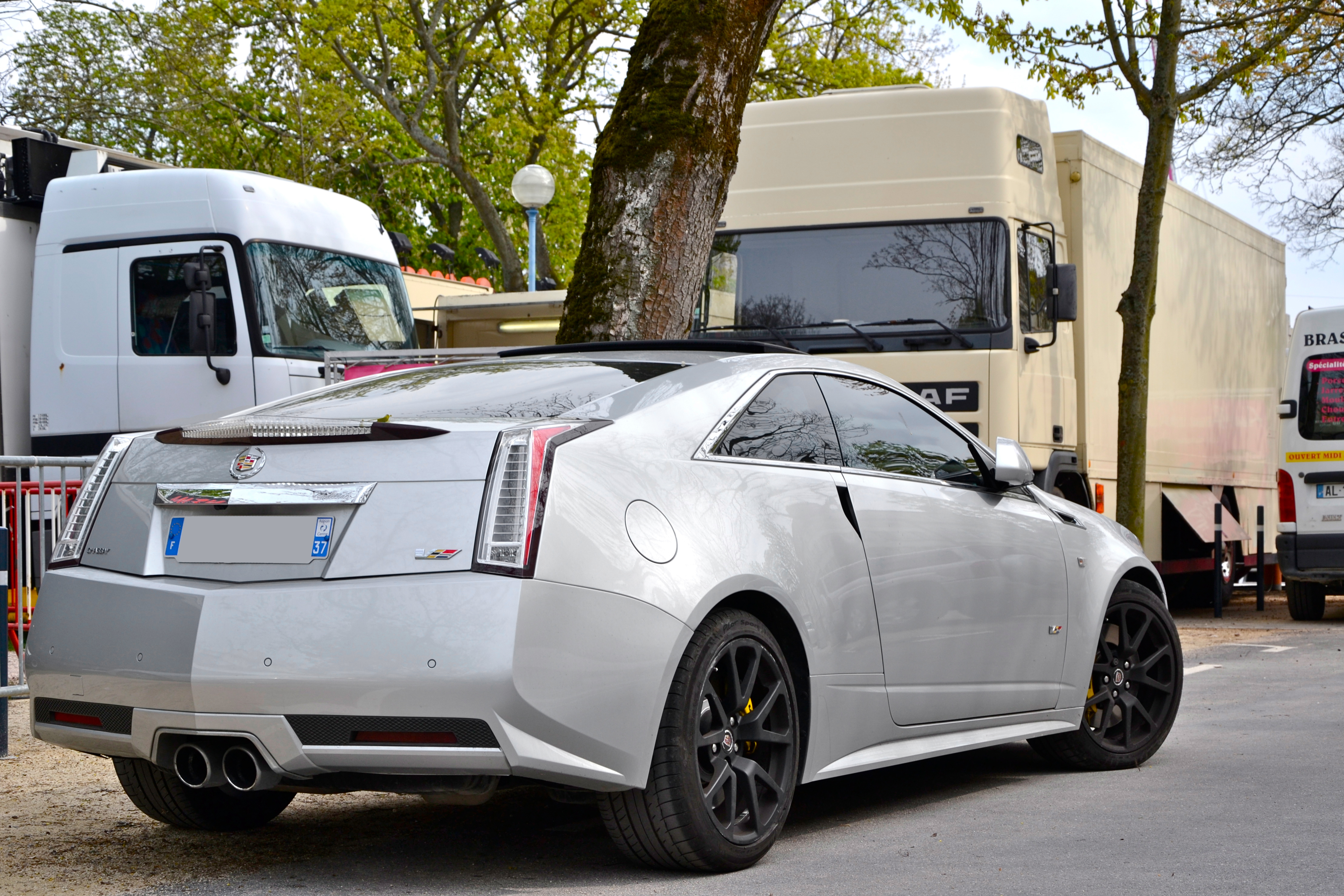 Cadillac CTS-V